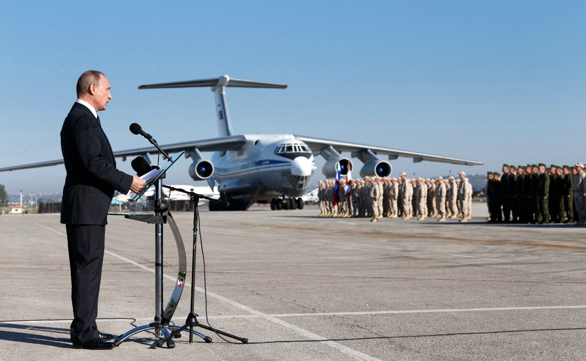 Выступление Президента России Владимира Путина перед российскими военнослужащими на авиабазе Хмеймим в Сирии.